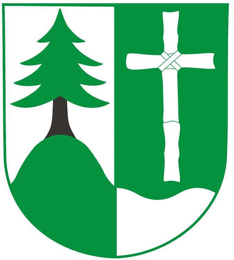 Znak obce Krásná Hora